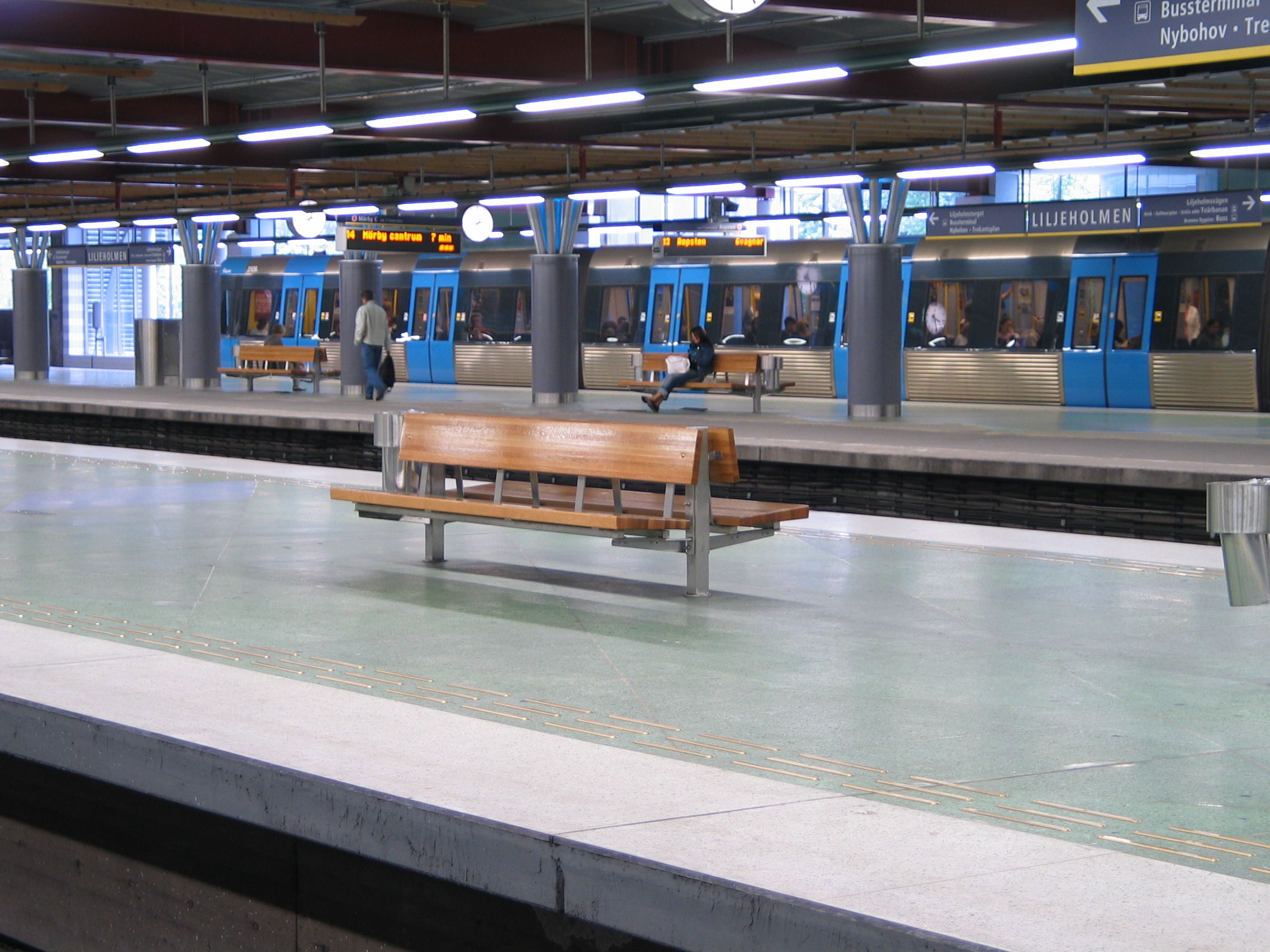 Liljeholmen, a metro station in Stockholm, Sweden.